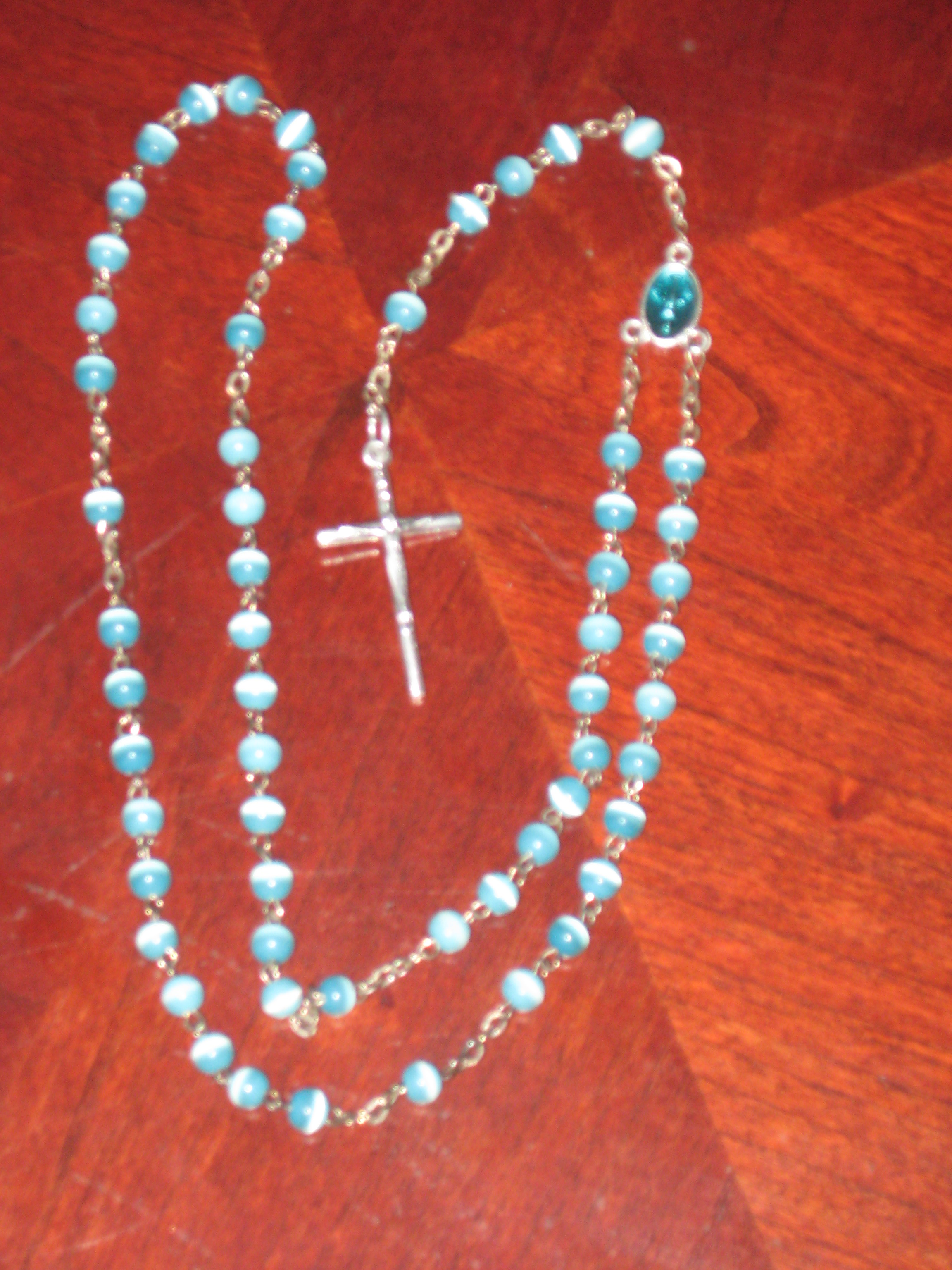 ഒരു കൊന്ത